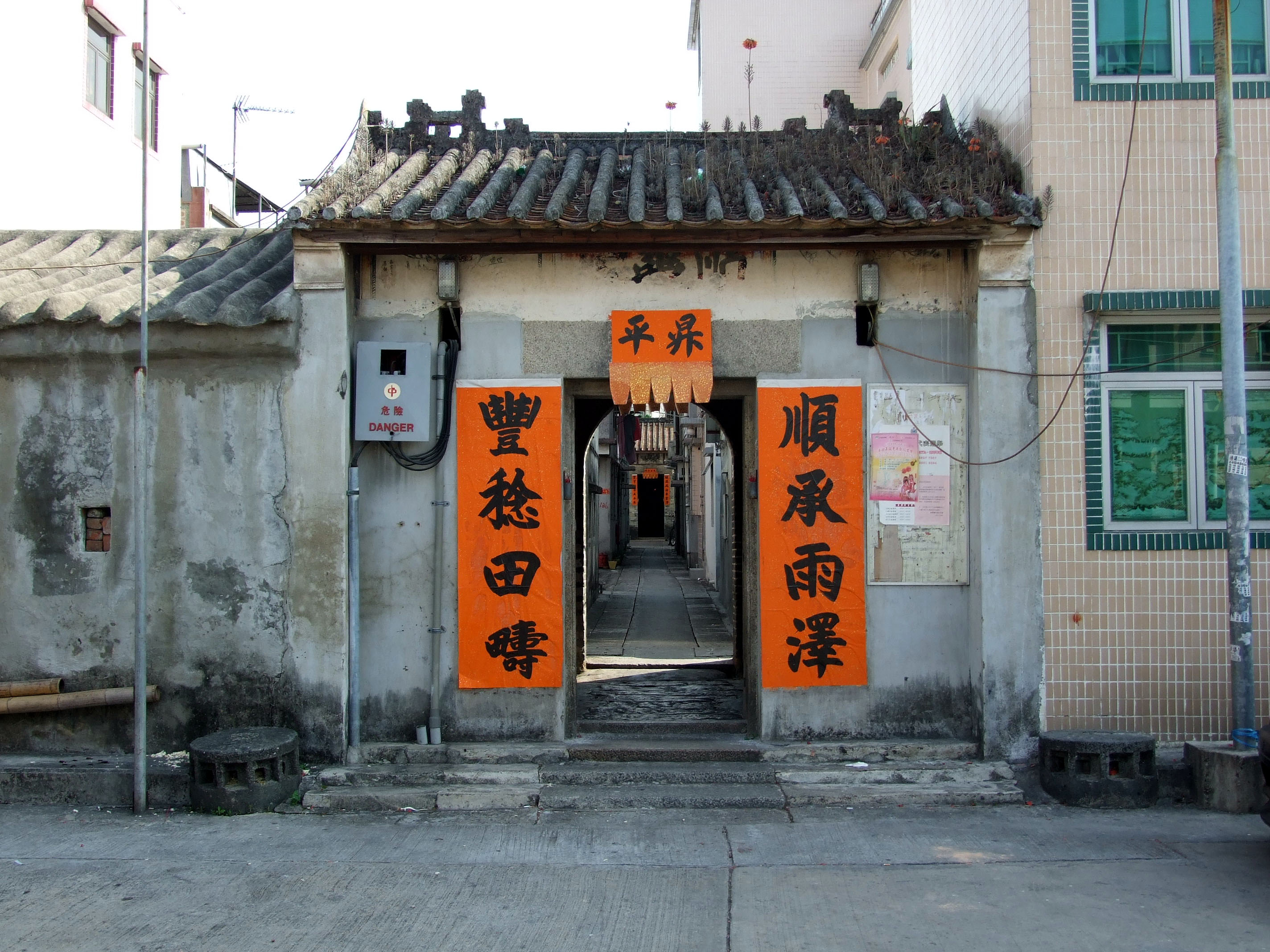 中文（香港）: 順風圍圍門